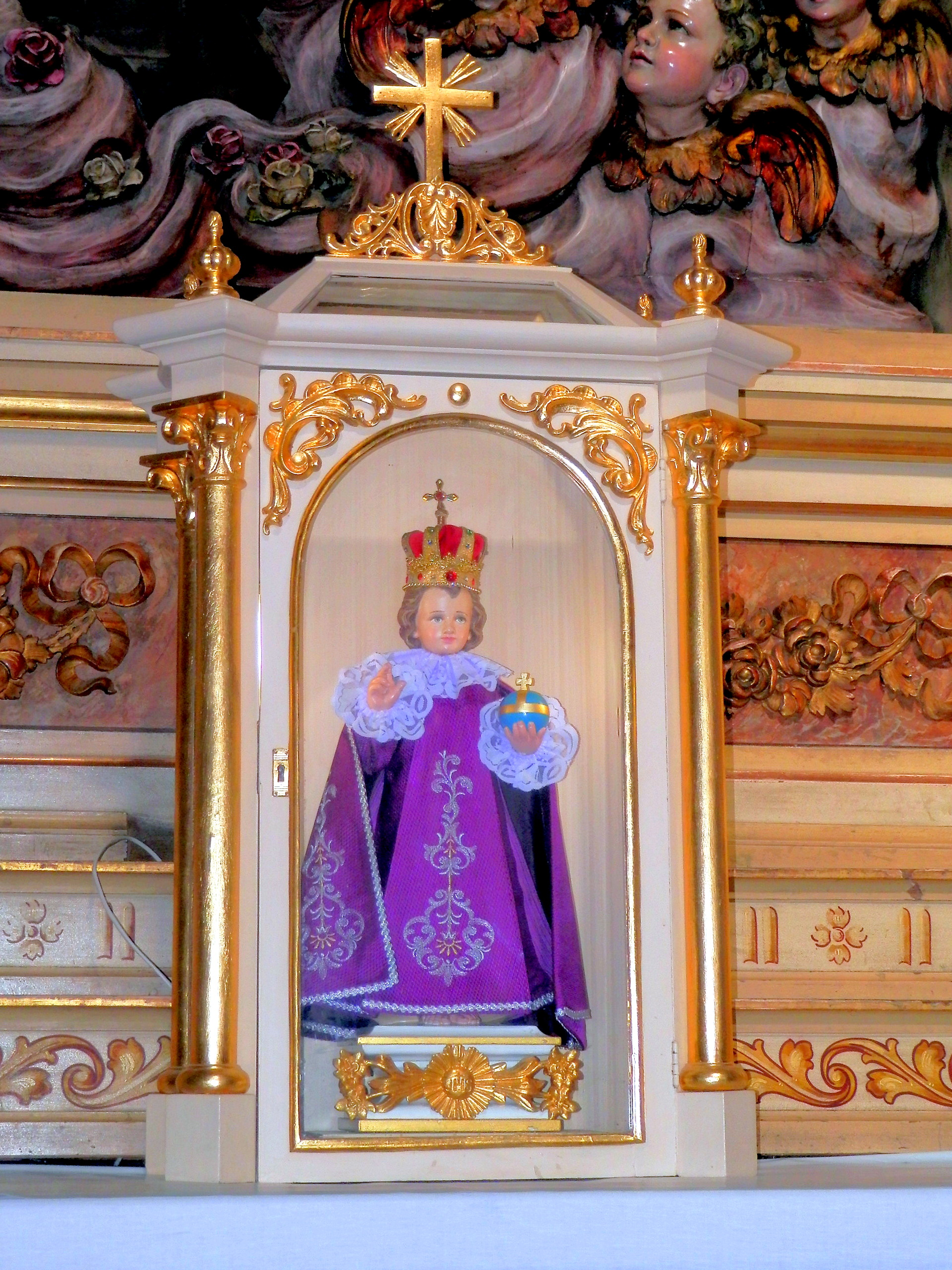 Streda 23.3.2016, kostol svätého Jozefa (Františkáni), veľkonočná výzdoba interiéru. Mesto Prešov.